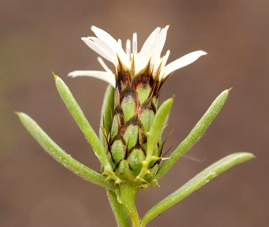 Atractylis arbuscula - Capítulo - Lanzarote (Islas Canarias, España).